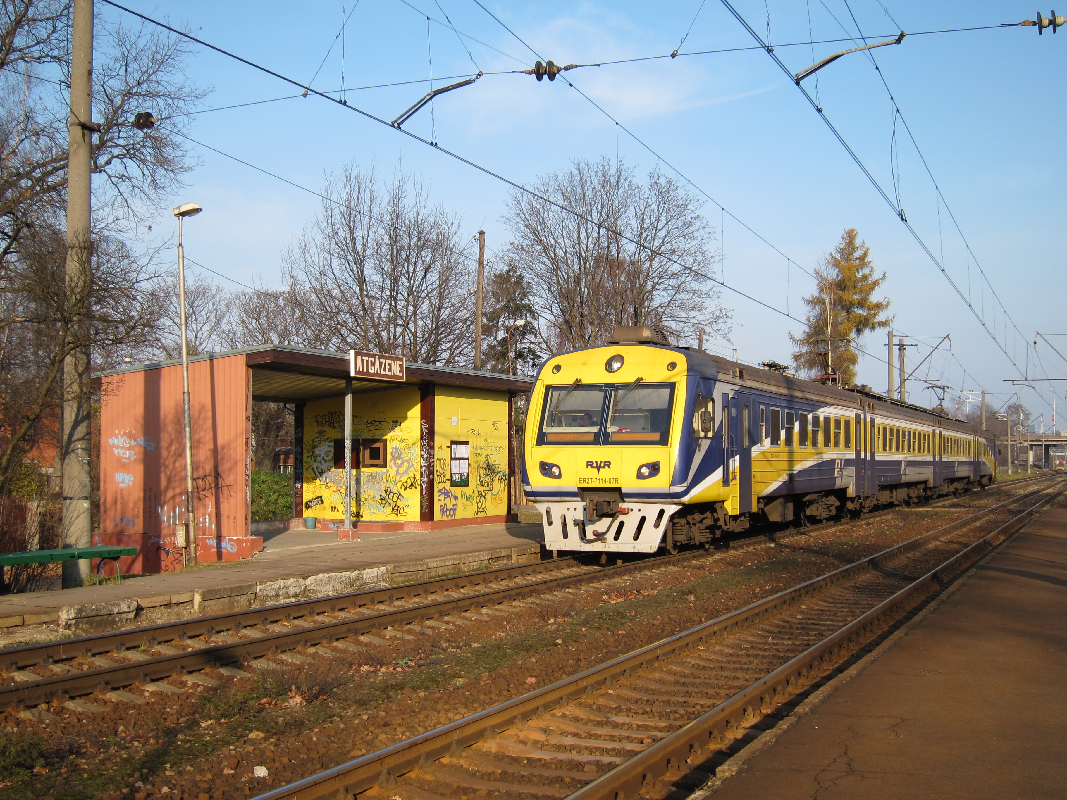 Elektrovilciens ER2T-7113/7114 pienāk Atgāzenes stacijā